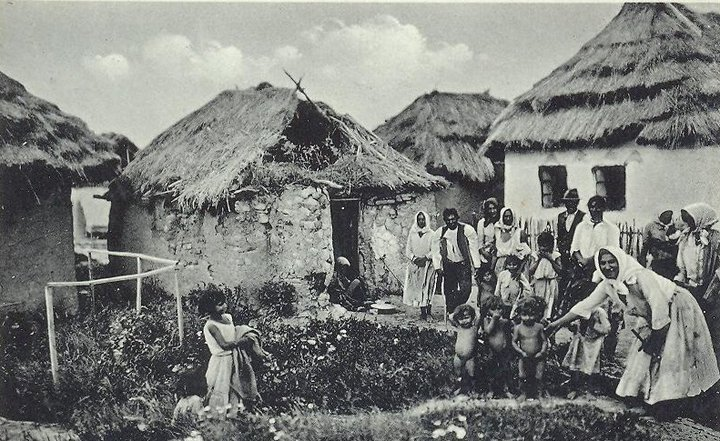 Cigánska osada na slovensku zo začiatku 20. storočia